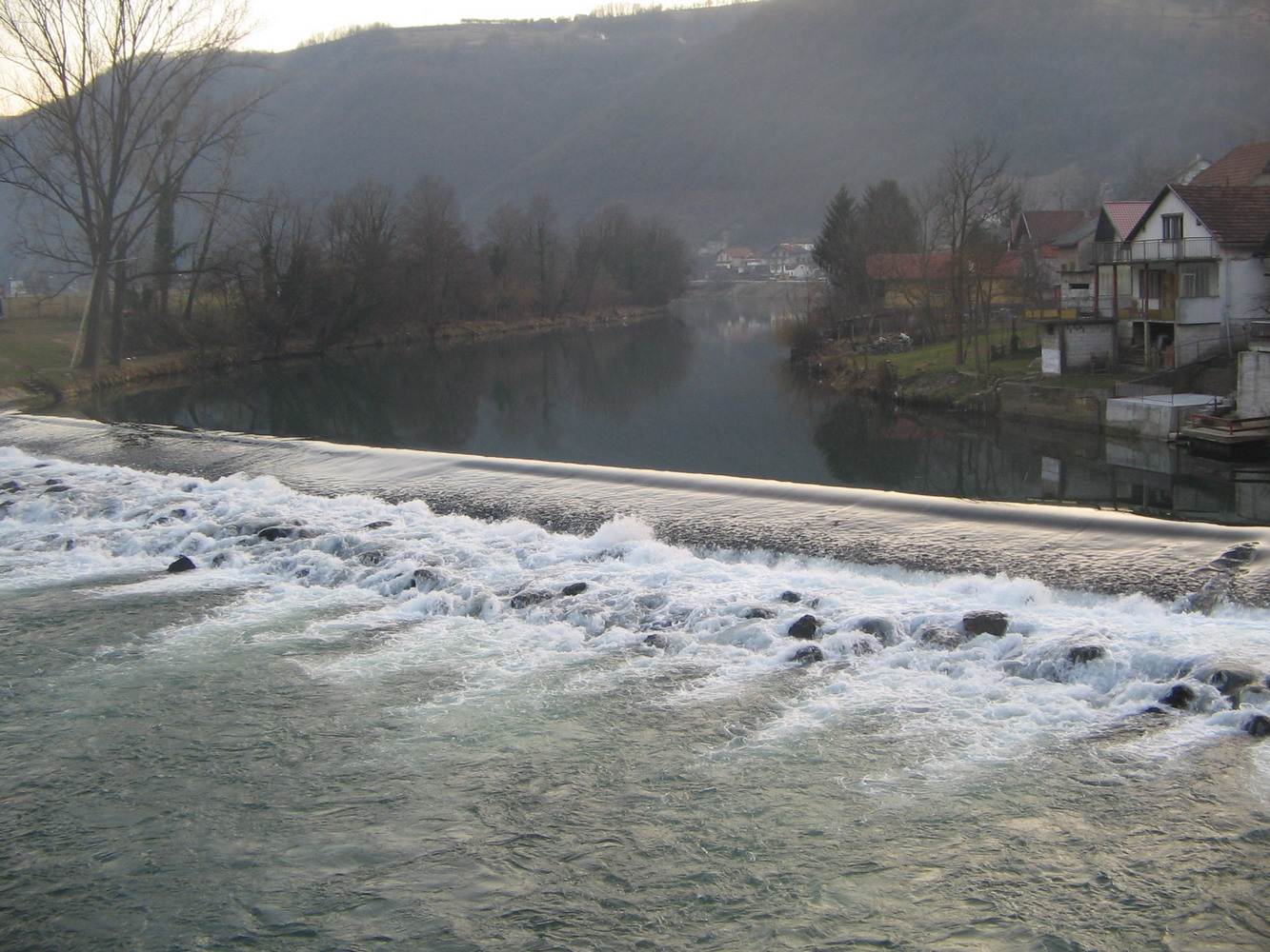 Врбас у Новоселији (Бања Лука)